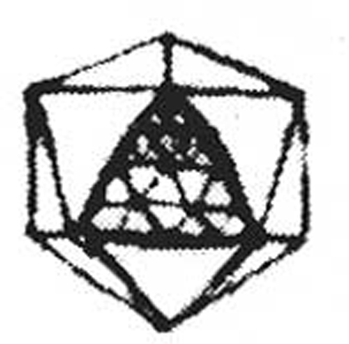 Porosity